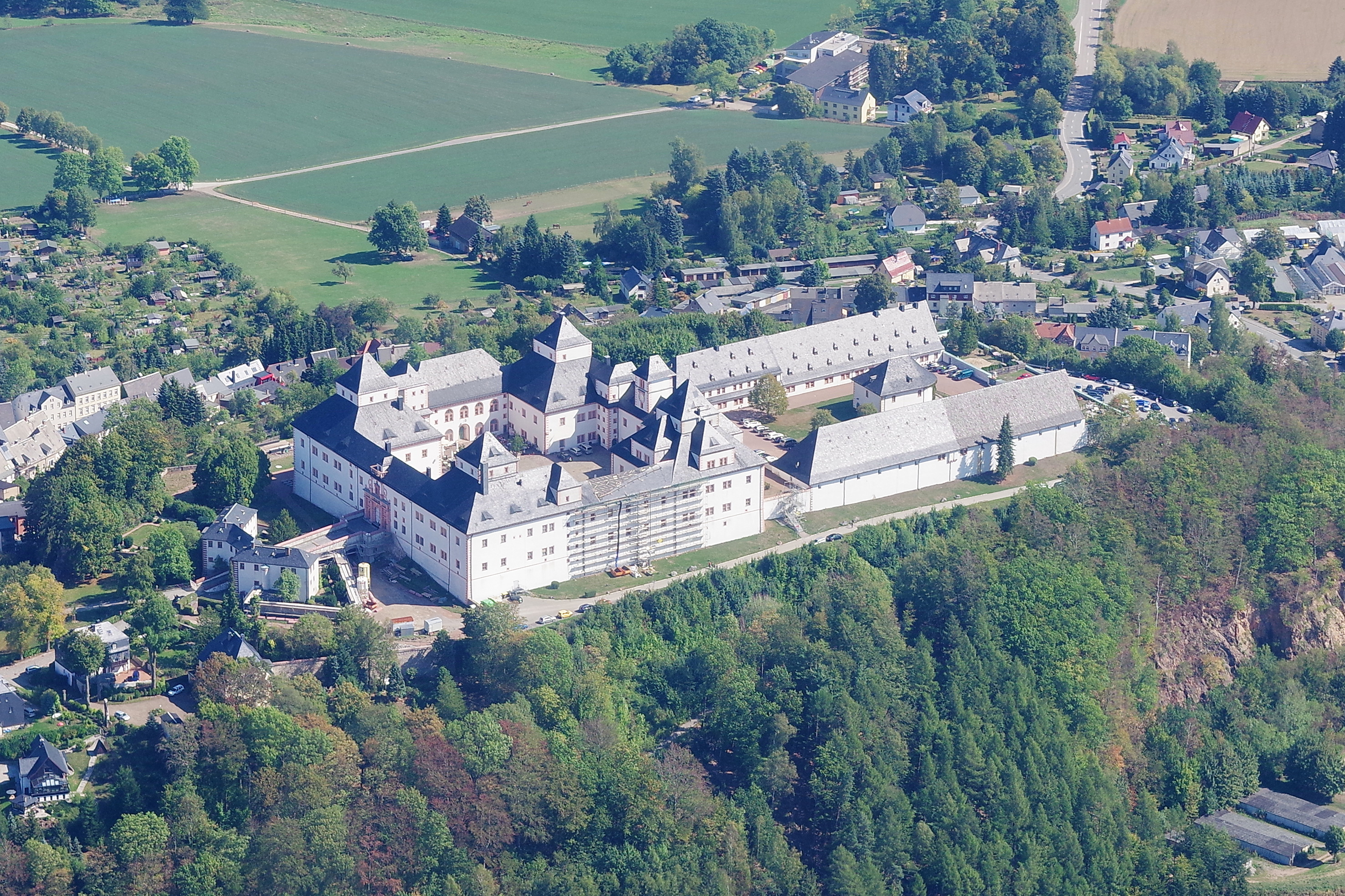 Jagdschloss Augustusburg mit Ort Augustusburg